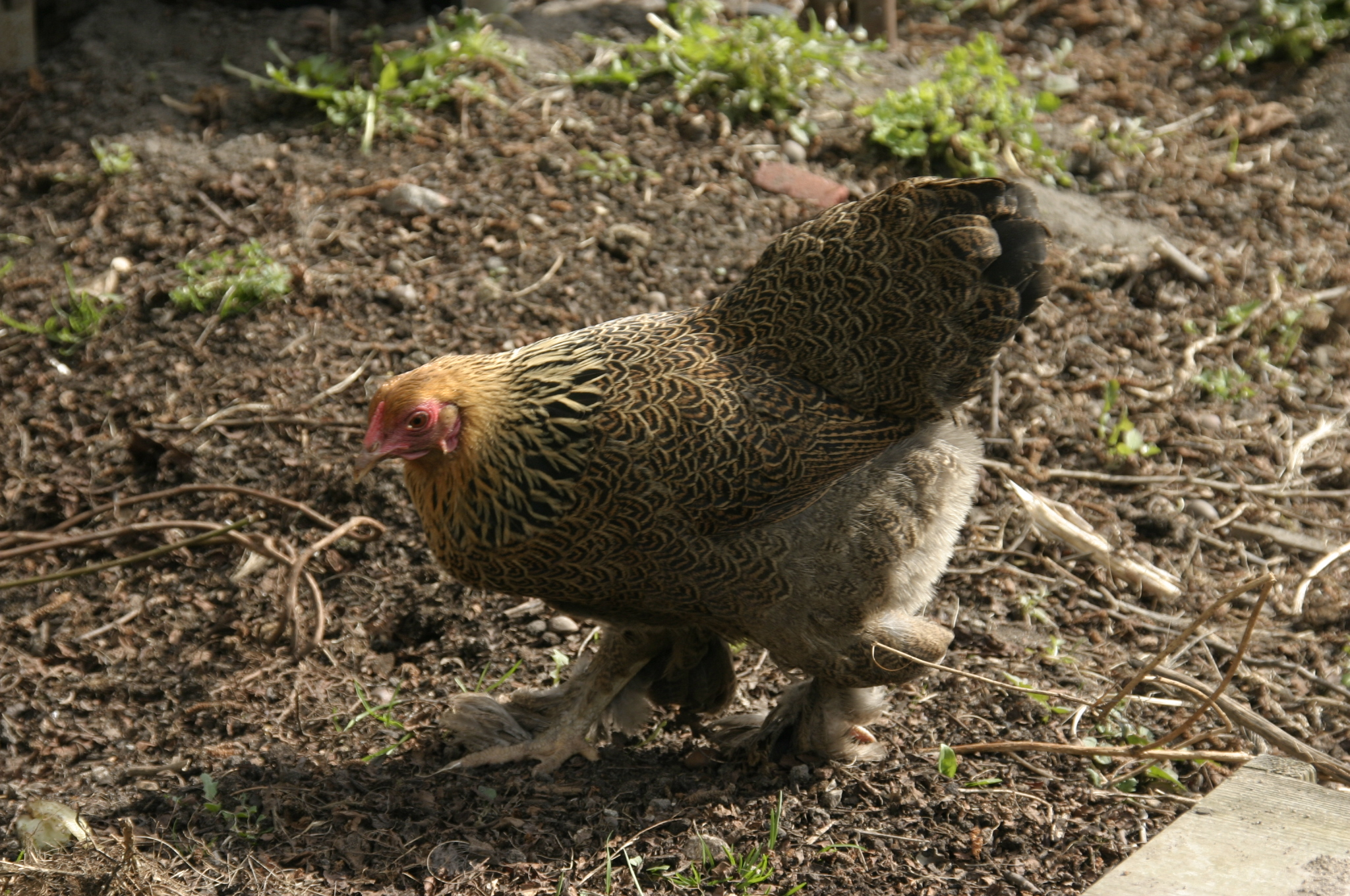 Zwerg-Brahma Henne rebhuhnfarben gebändert